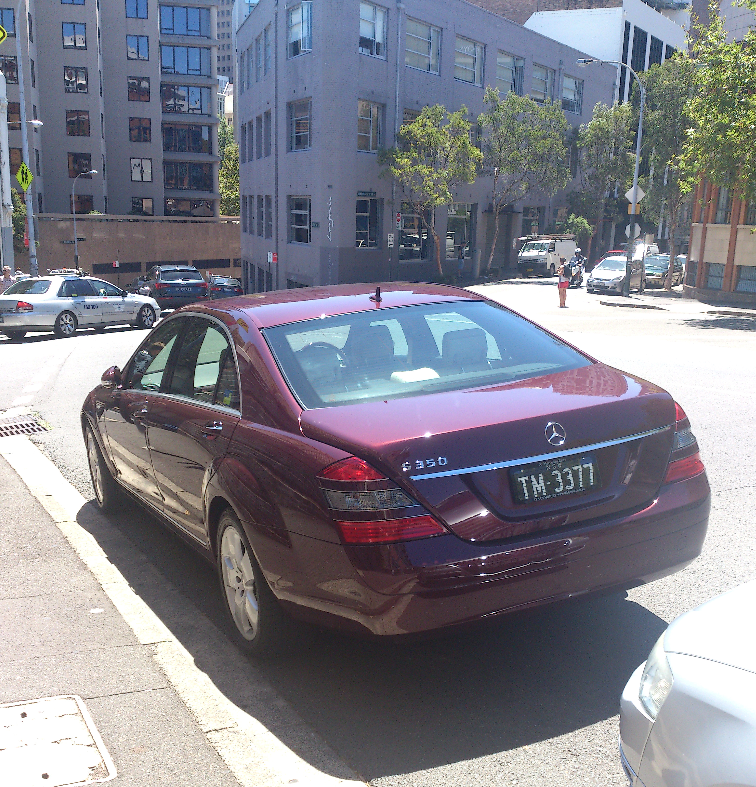 Mercedes-Benz S350